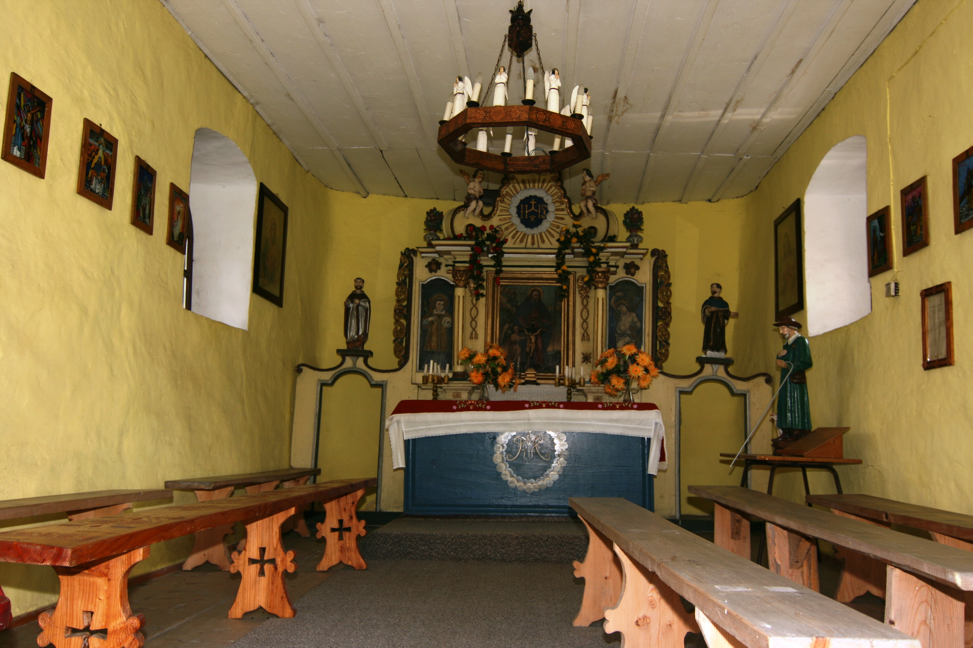 Wnętrze kapliczki św. Rocha przy ul. Trzech Koron w Krościenku nad Dunajcem